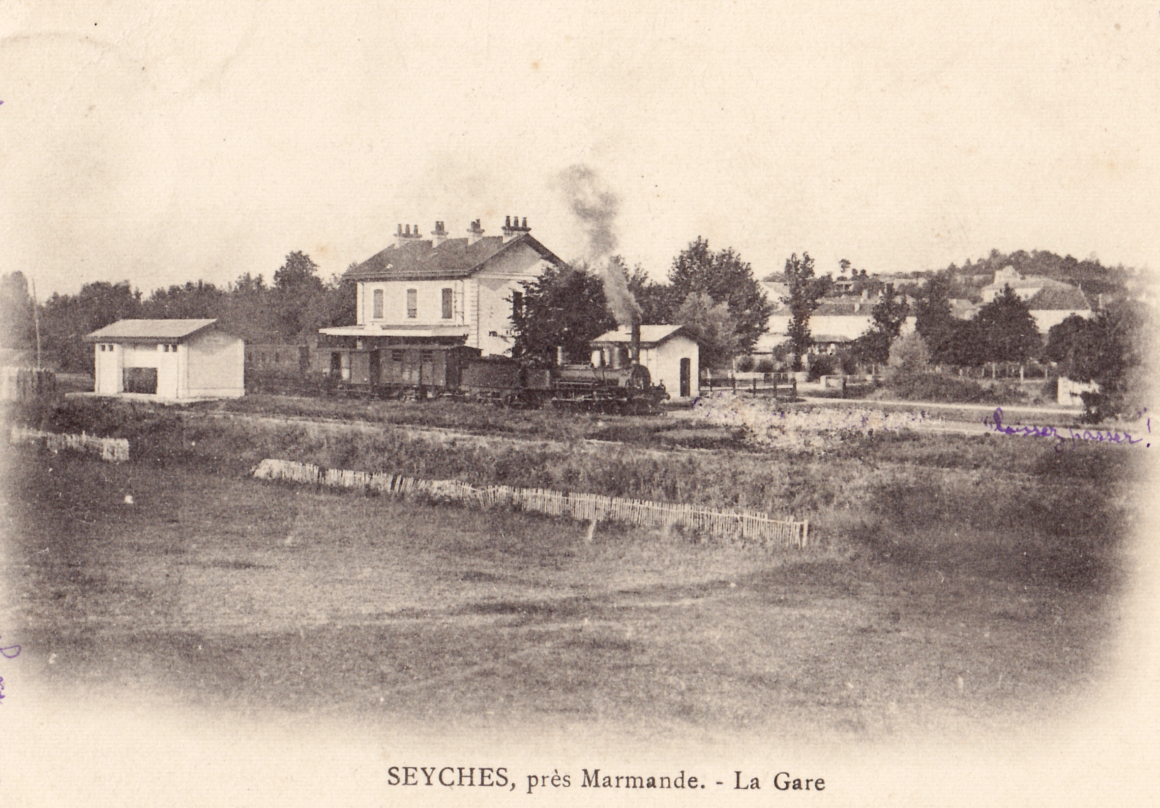 Carte postale ancienne éditée par Mme Brune à Marmande : SEYCHES - La Gare